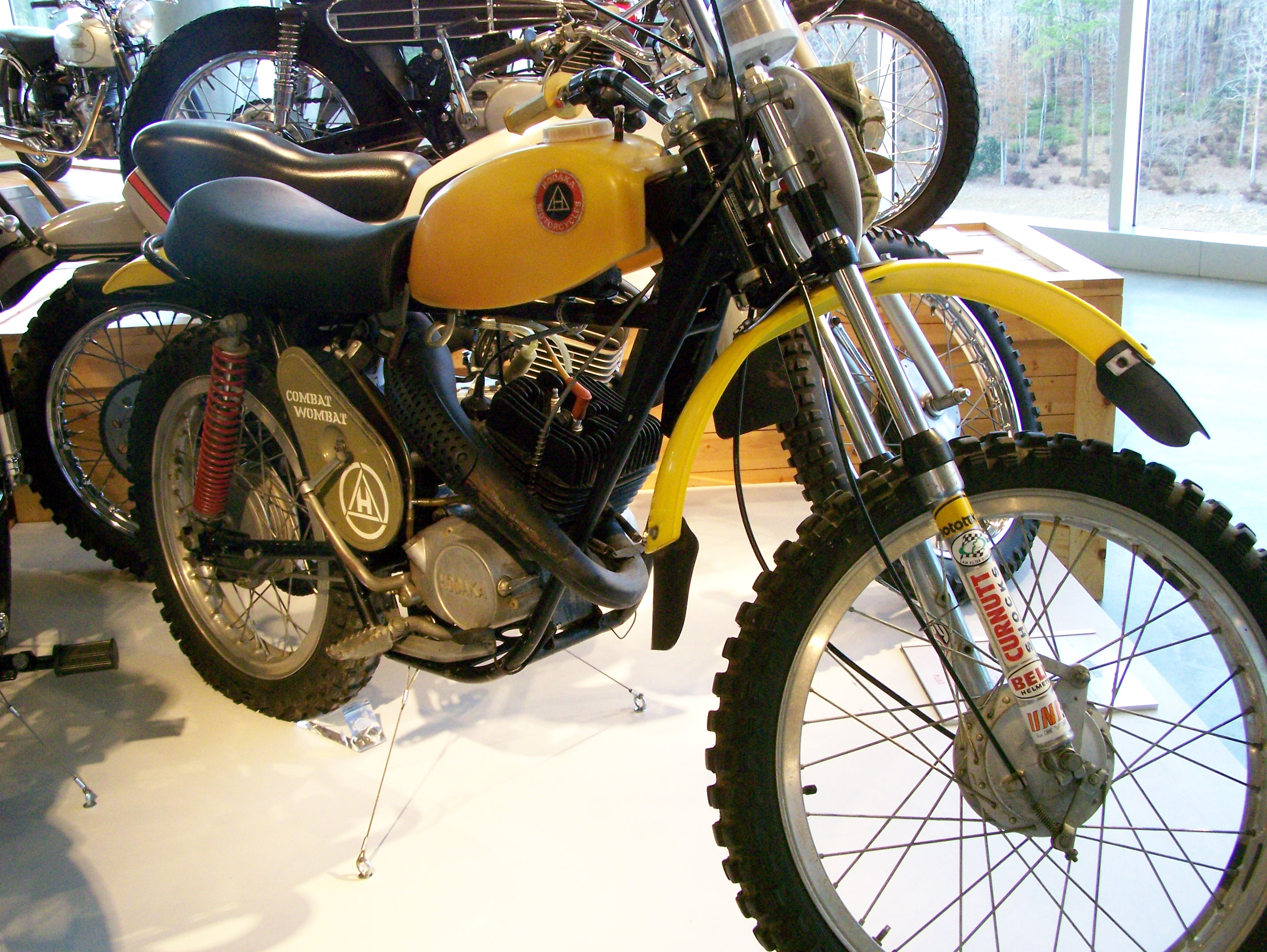 Barber Vintage Museum_425 Hodaka Combat Wombat